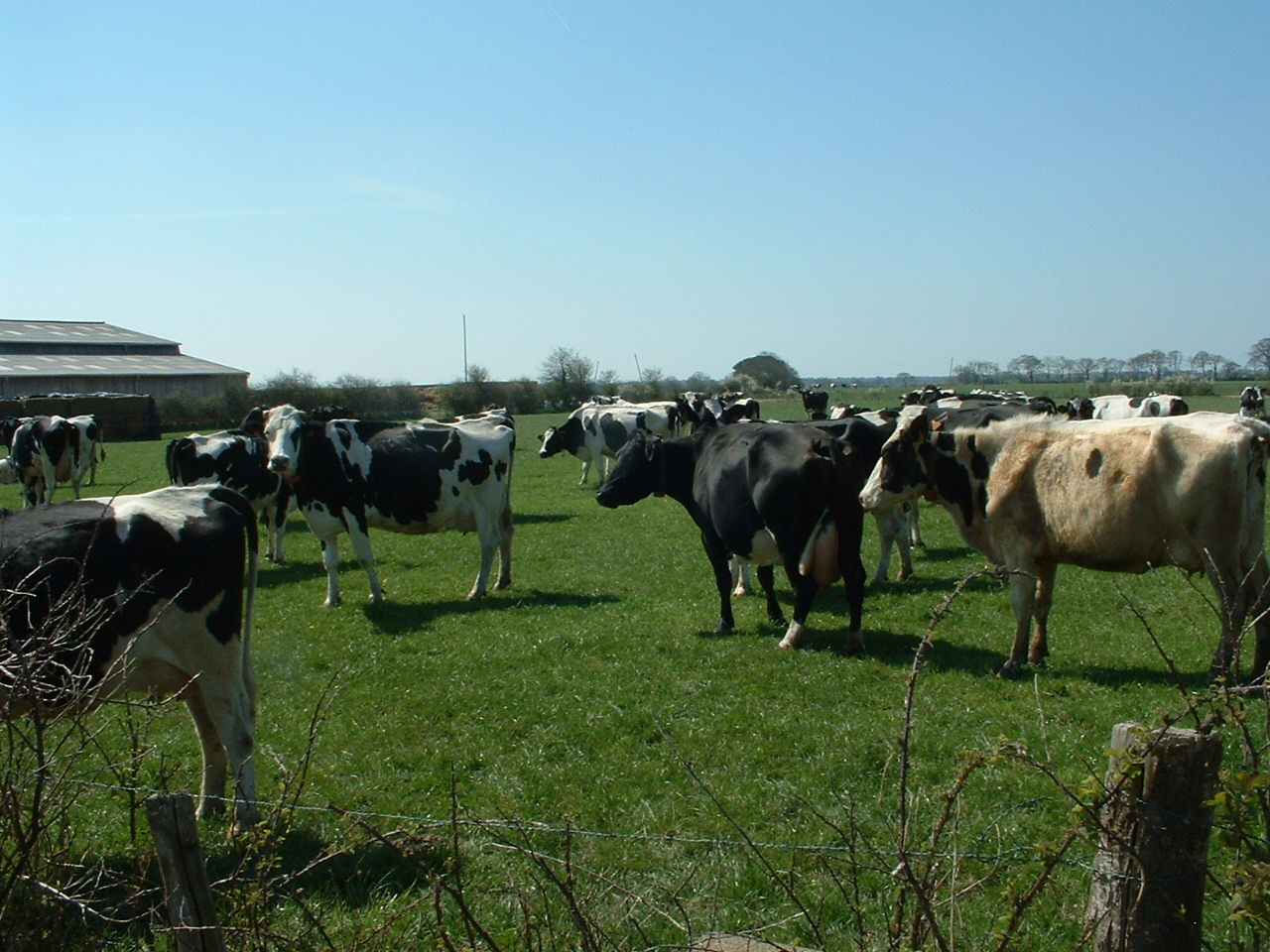 Chauvé (France) - Troupeau de vaches